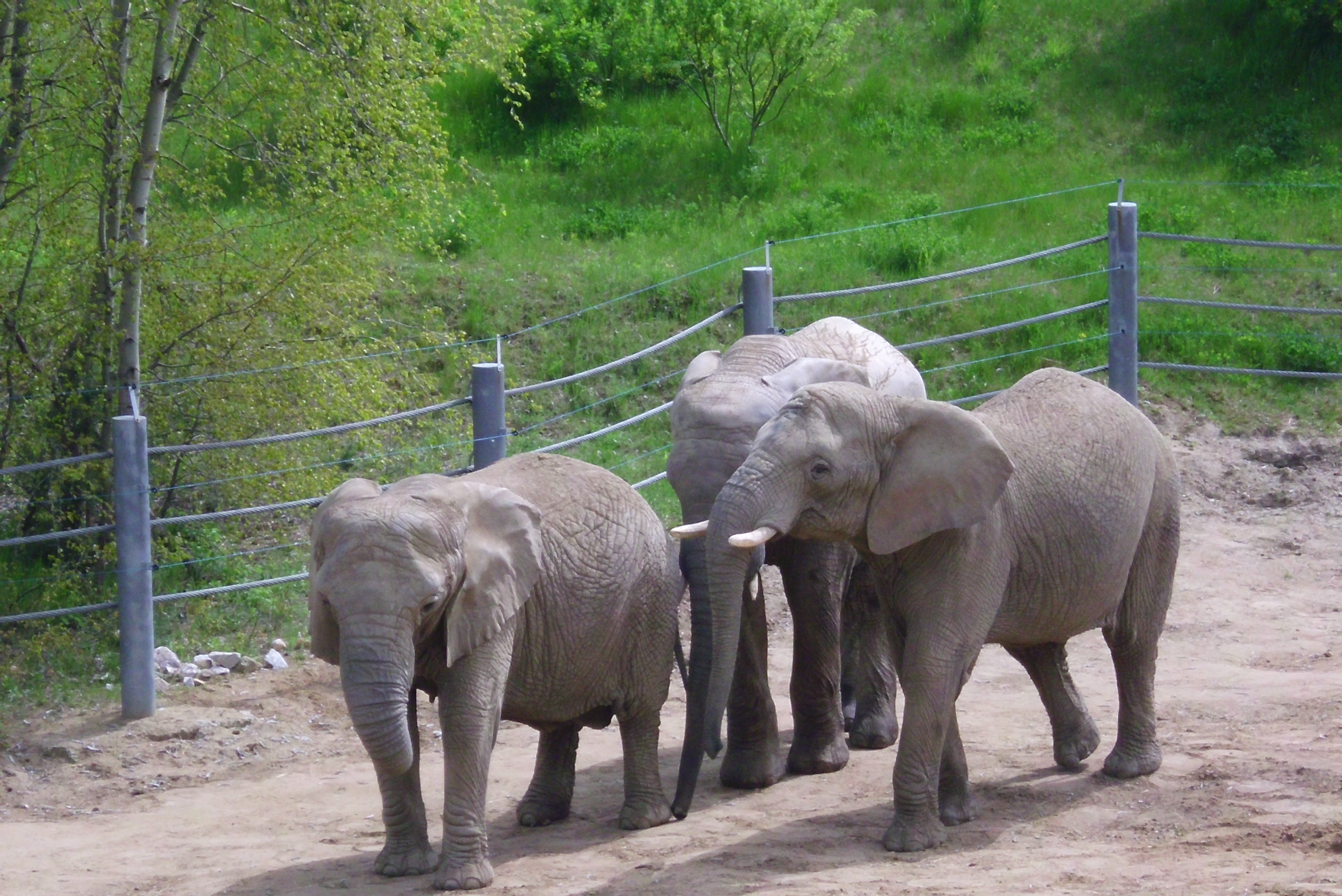 2014 Poznań za pół ceny - Nowe Zoo